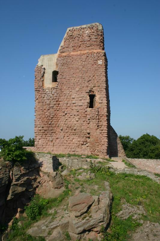 Burg Kyffhausen - Bergfried der Oberburg